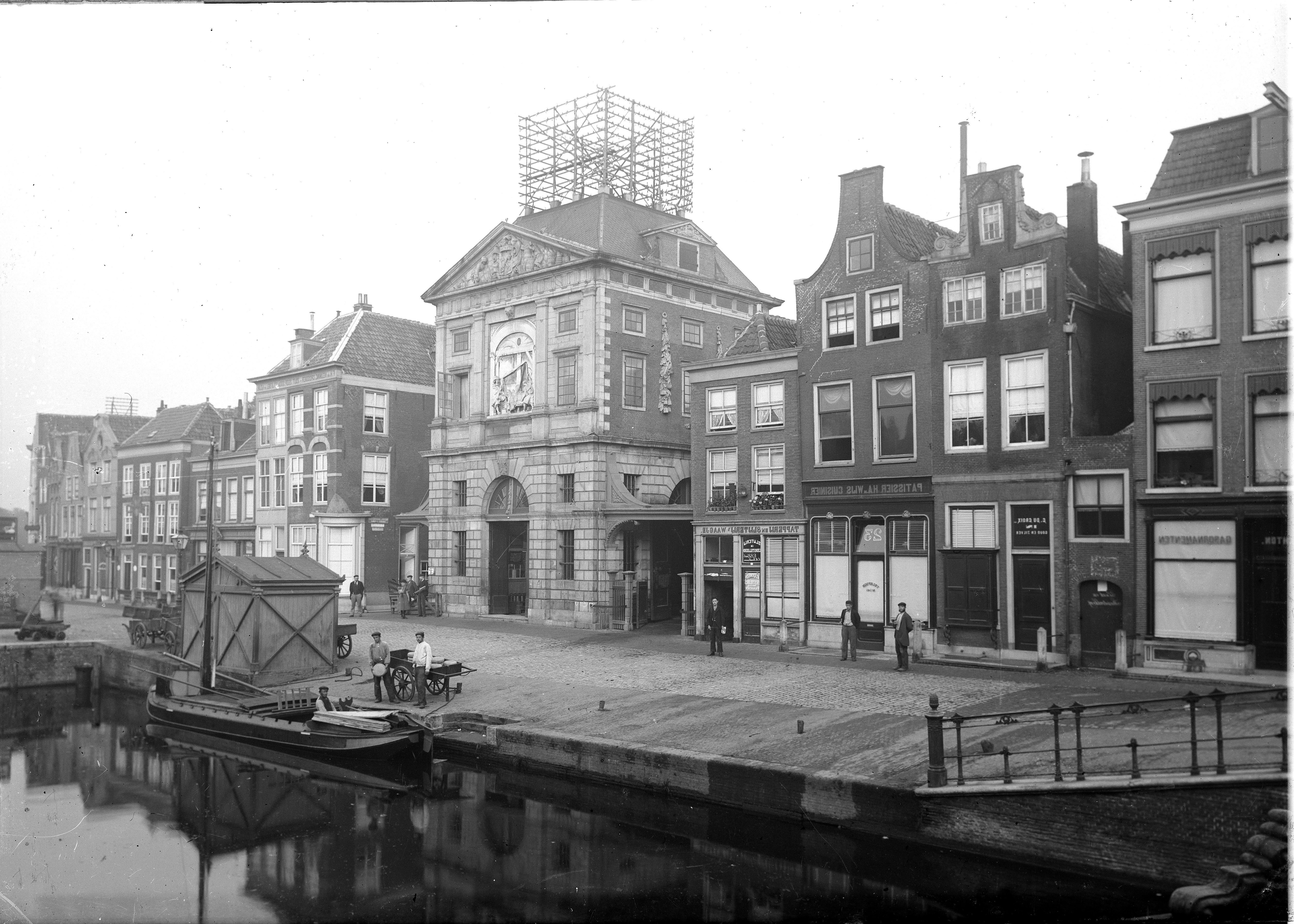 Gezicht op de Waag aan de Aalmarkt